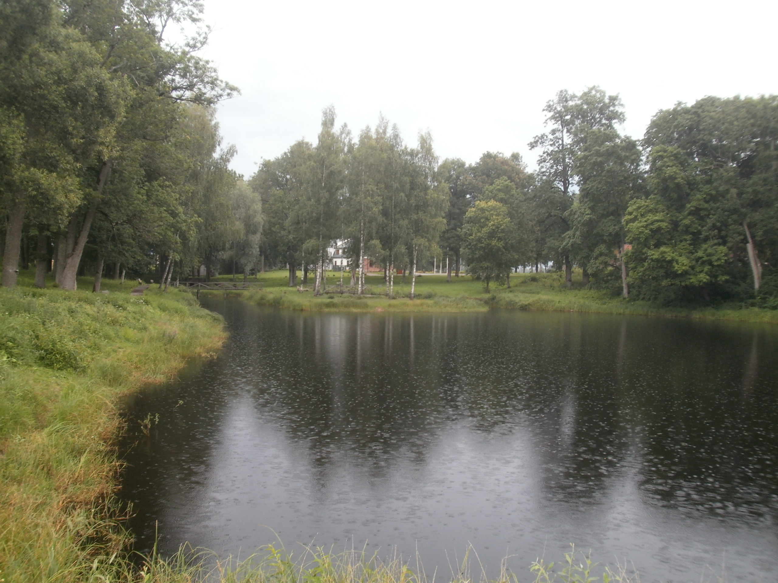 Luke mõisatiik, vaade kirdesse. Taamal mõisa peahoone, 2014 juulis.